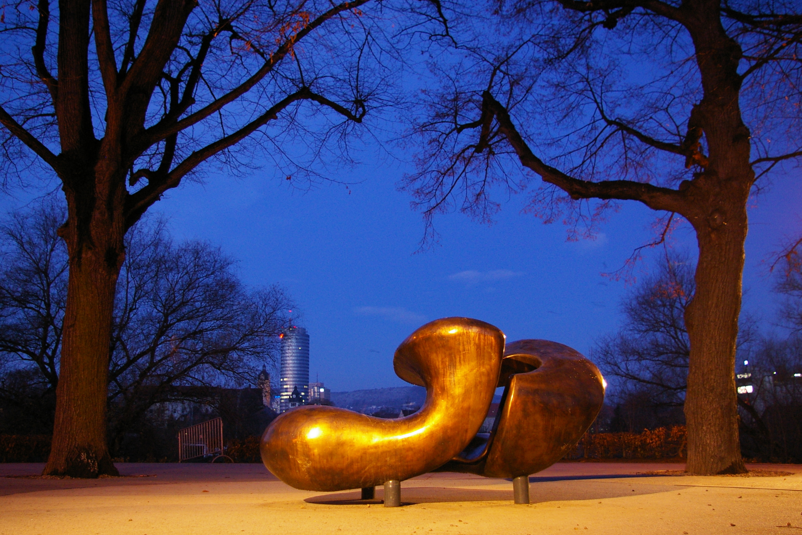 Die Bronzeplastik "Saalewelle" von Thomas Reichstein am Wenigenjenaer Ufer der Saale in Jena